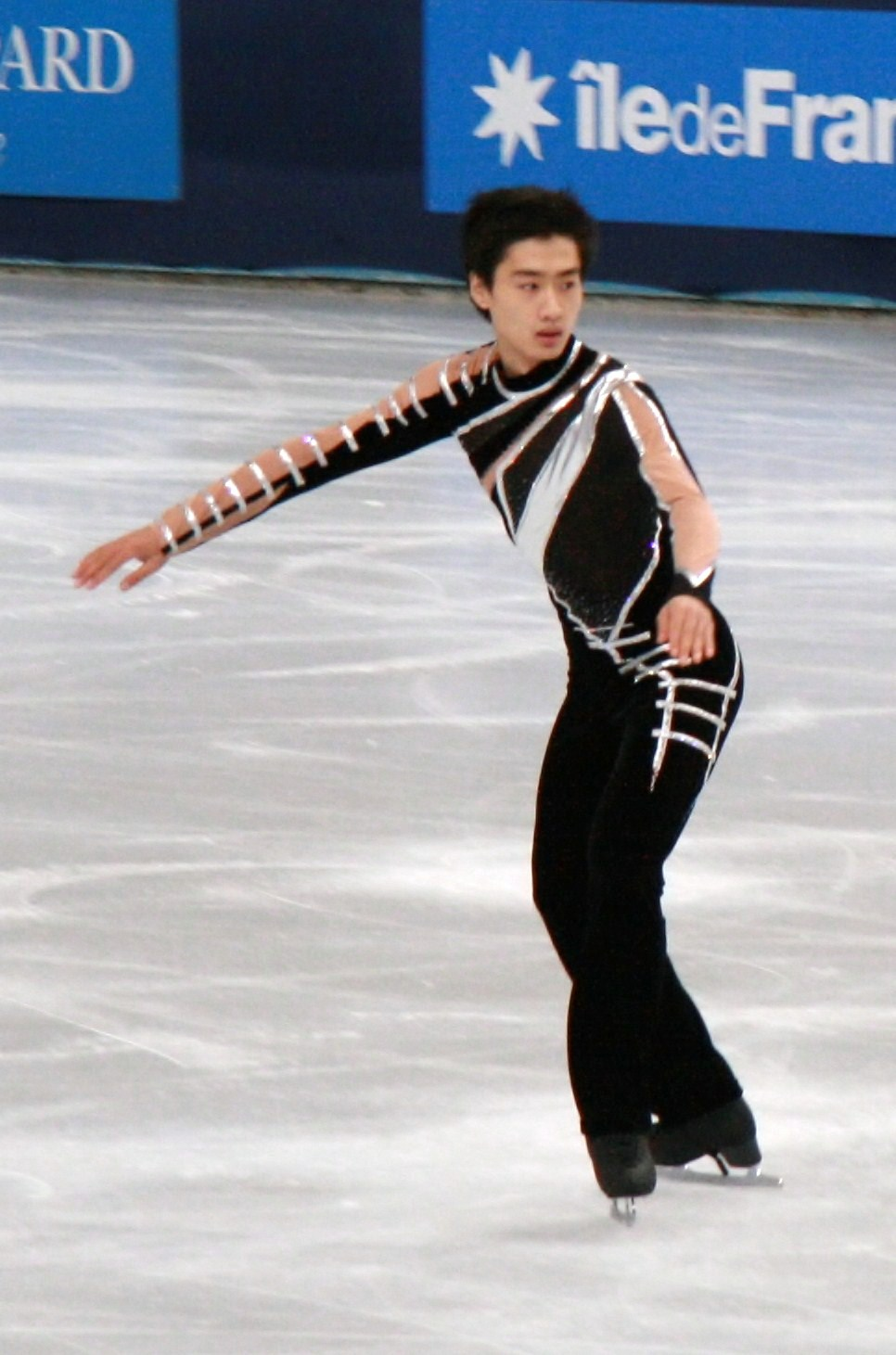 Сун Нань на 2011 Trophée Eric Bompard